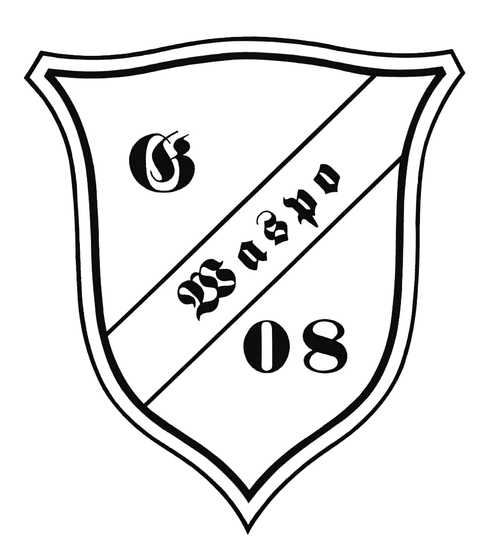 Vereinswappen der Wasserportvereinigung Göttingen von 1908 e.V.